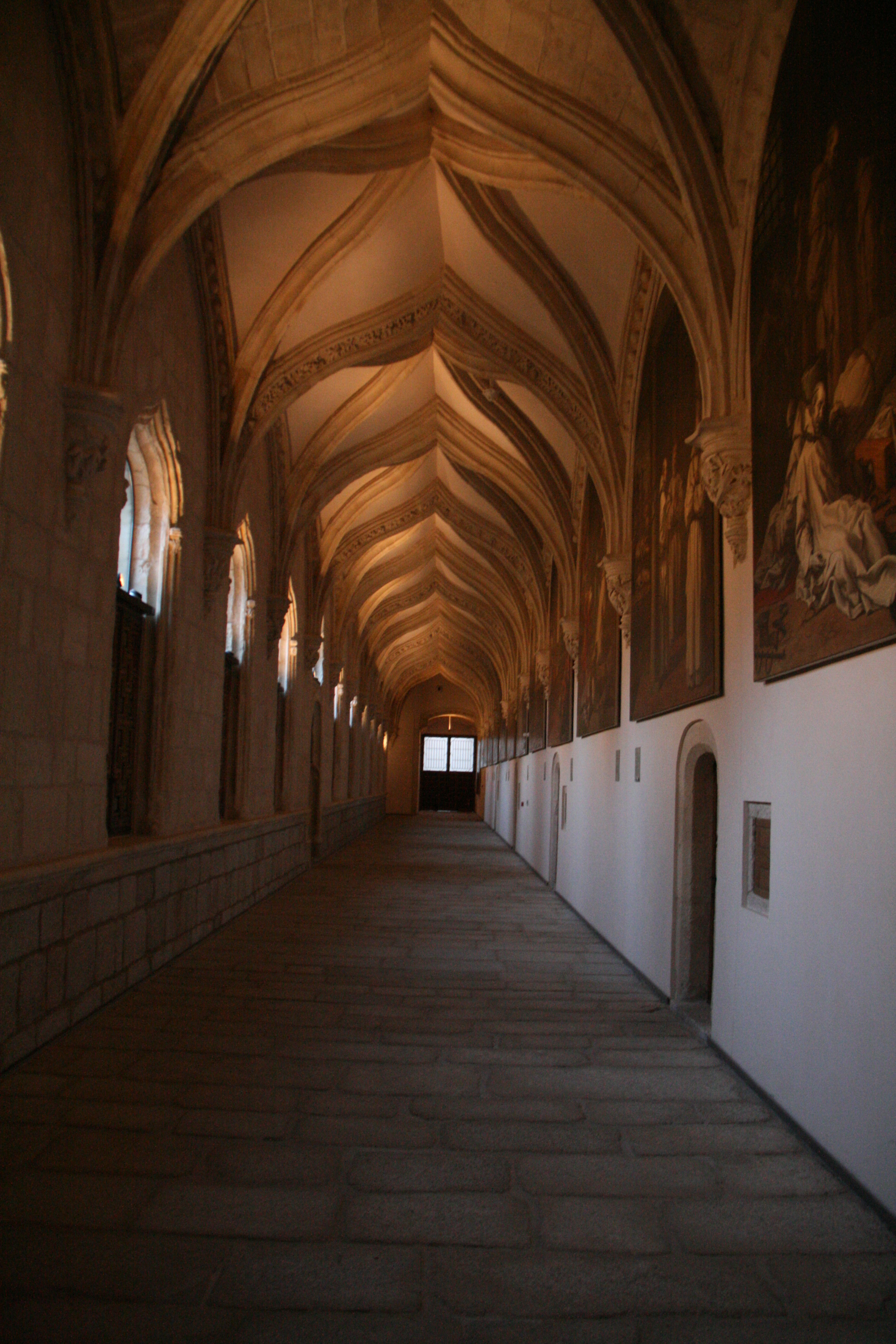 Claustro tras la restauración con las pinturas de Vicente Carducho - Panda Oeste - Interior de Cúpulas conopilaes - Monasterio del Paular